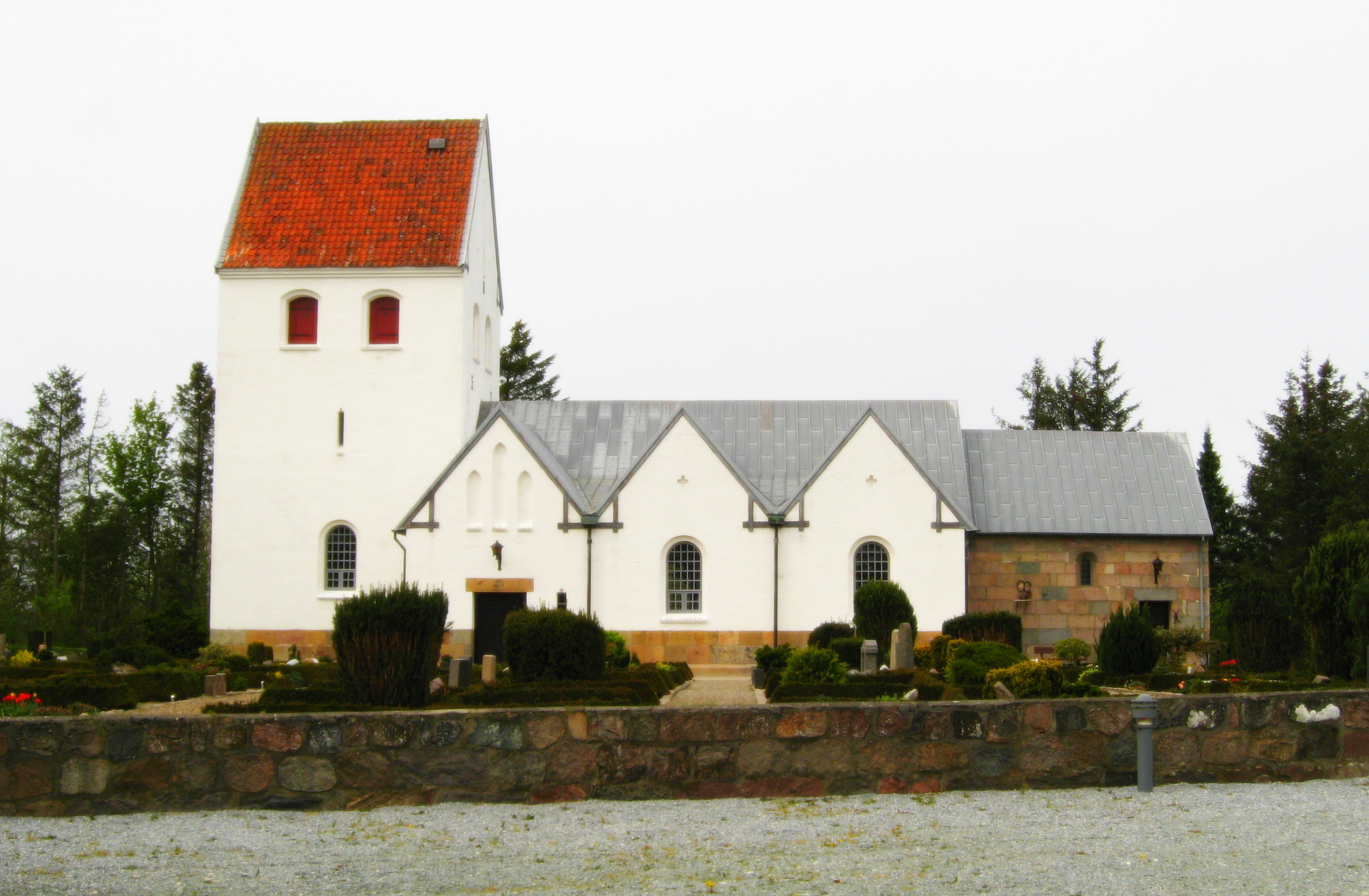 Uggerby Kirke, Hjørring Kommune